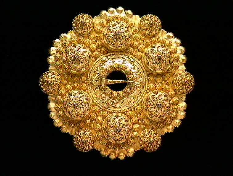 Bolesølje i forgylt sølv, datert 1914 og laget av Eivind G. Tveiten i Lårdal, Telemark. Stemplet E. G. TVEITEN / 830 S. Foto Anne-Lise Reinsfelt / Norsk Folkemuseum, NF. 1968-0744.